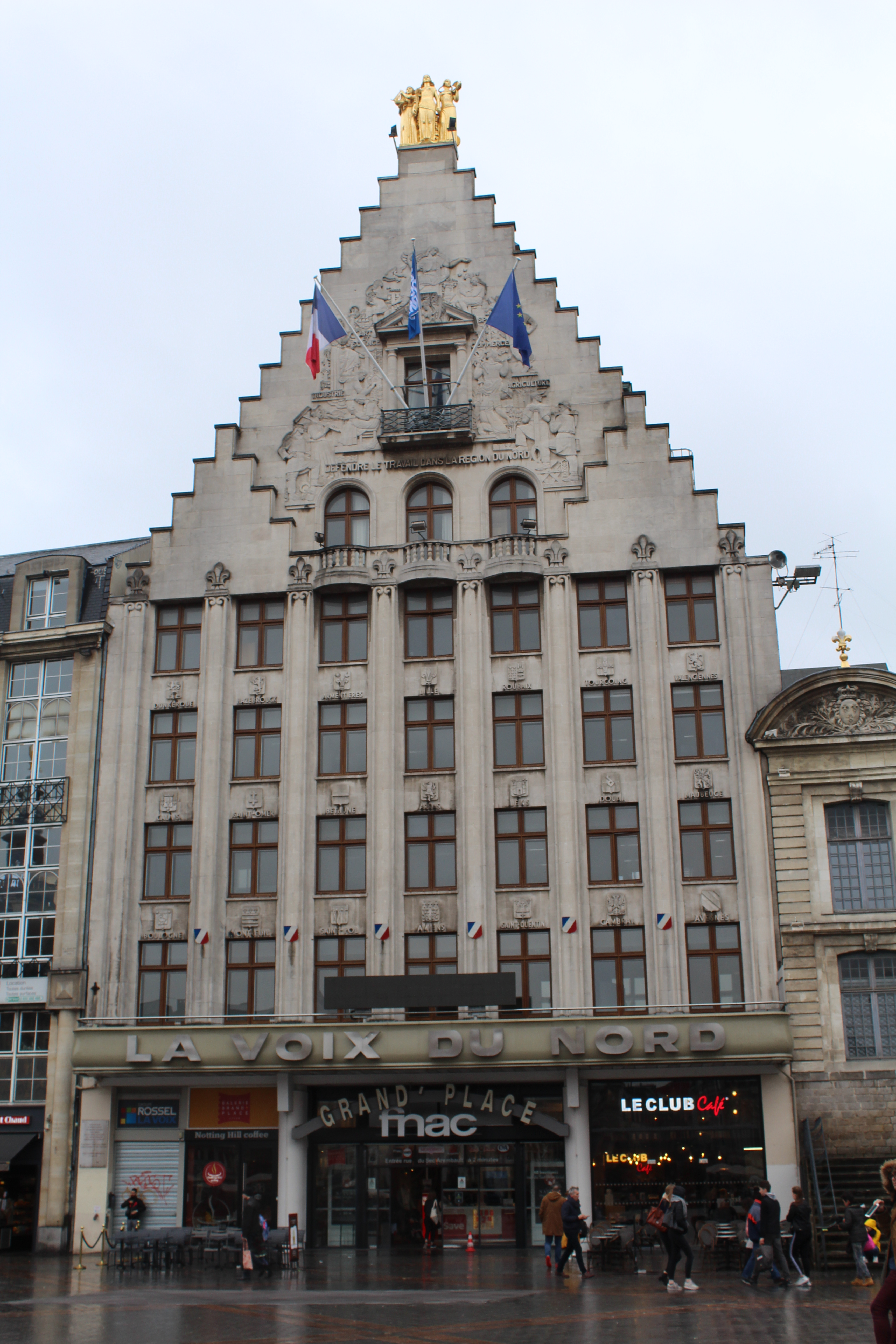 Bâtiment de La Voix du Nord, Lille.